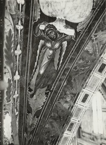 Cimabue, volta evangelisti, fasce decorative 08 angelo telamone